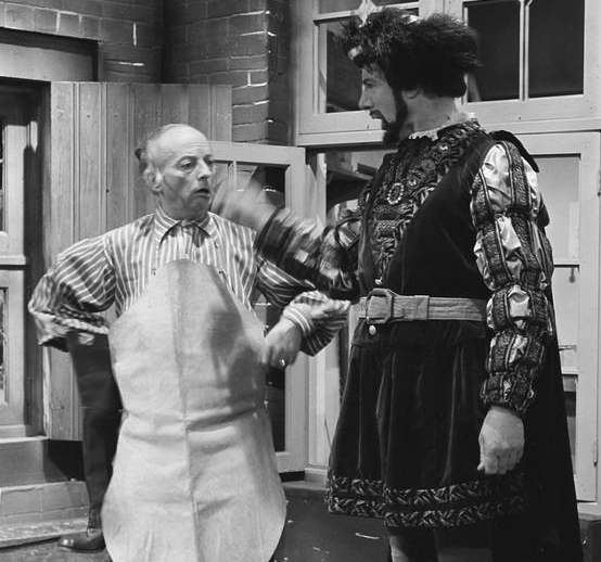 Niek Engelschman (links) met Arend Hauer in Vrouwtje Bezemsteel 1964